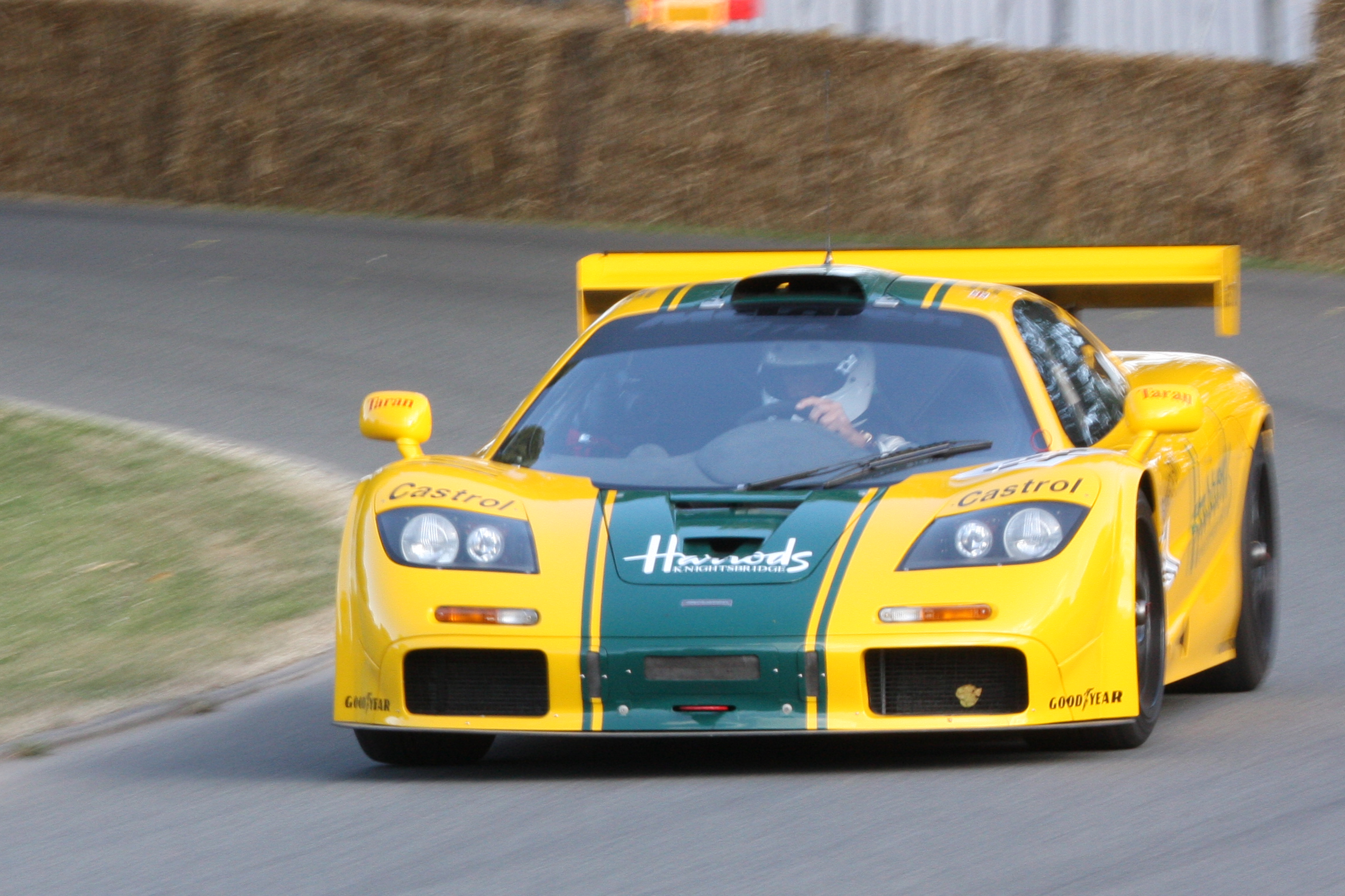 1995 McLaren-BMW F1 GTR